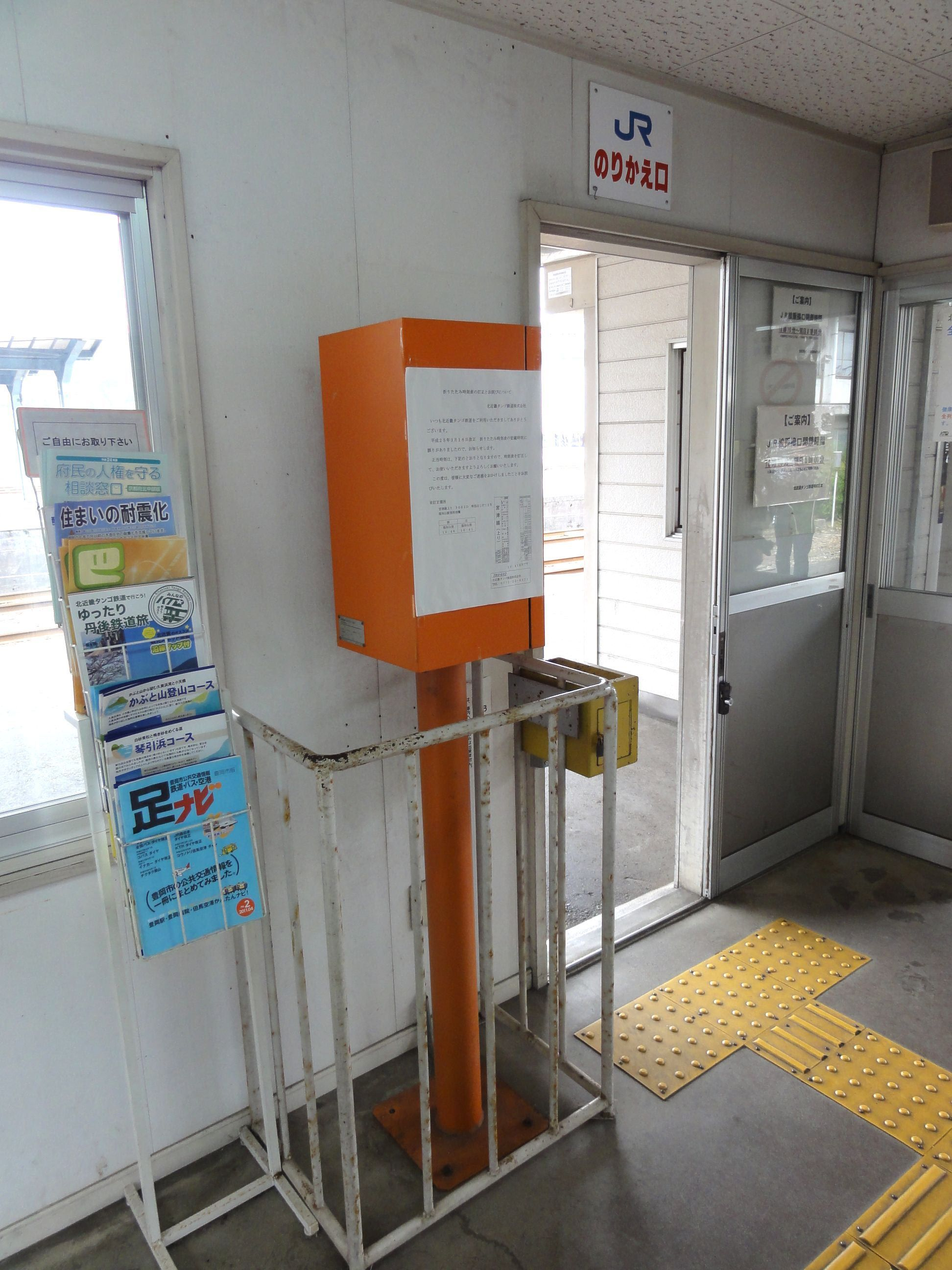 北近畿タンゴ鉄道・豊岡駅のJR連絡用の中間改札